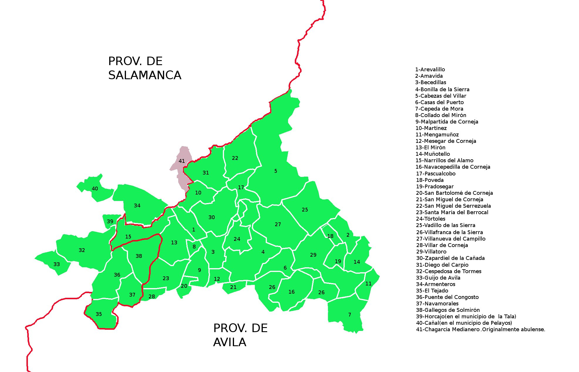 Se presentan los diversos municipios que forman el Sexmo de Serrezuela que coinciden con los territorios del Arciprestazgo de la Diócesis de Avila del mismo nombre.